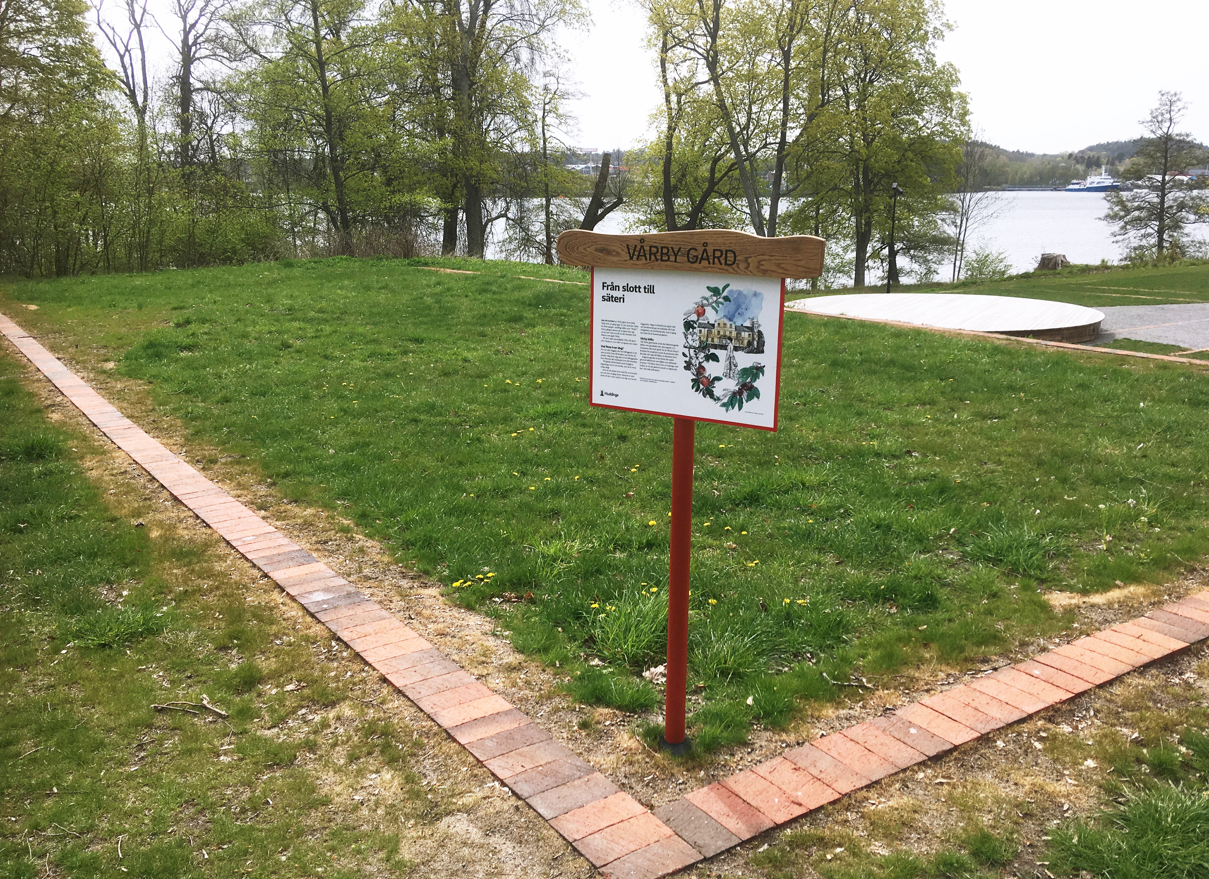 Vårby Herrgårdspark i Vårby, Huddinge kommun